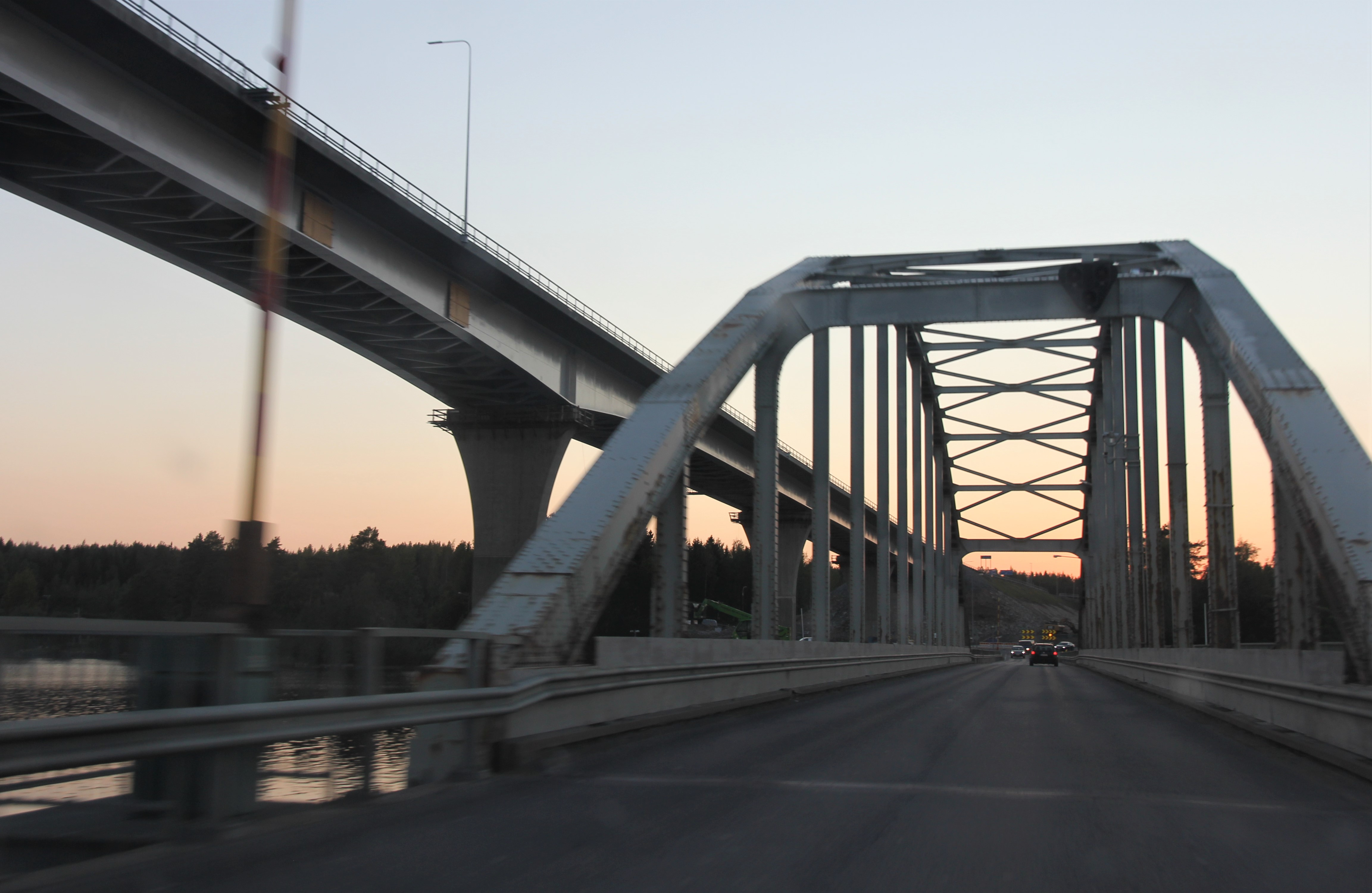 Jännevirran uutta (vasemmalla) ja vanhaa, Saimaan syväväylän ylittävää valtatien 9 siltaa Kuopion ja Siilinjärven rajalla Jännevirran kylän kohdalla. Kuvassa tullaan vanhalle sillalle idästä (Kuopion puolelta); uutta siltaa ei vielä tällöin oltu avattu liikenteelle.